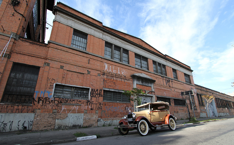 Fábrica Ford - 2010